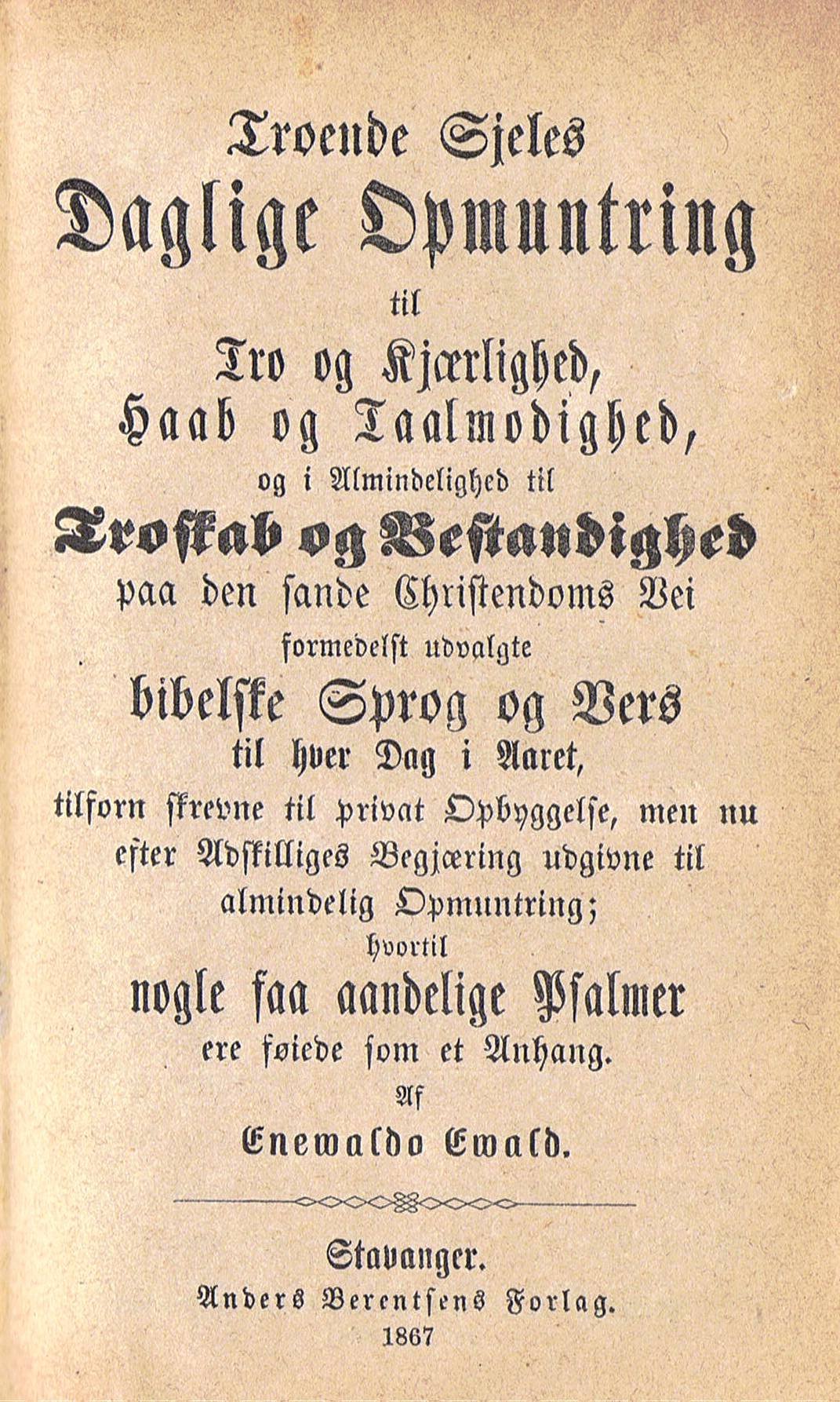 Forside av Enevold Ewalds bok Troende sjels daglige oppmuntring